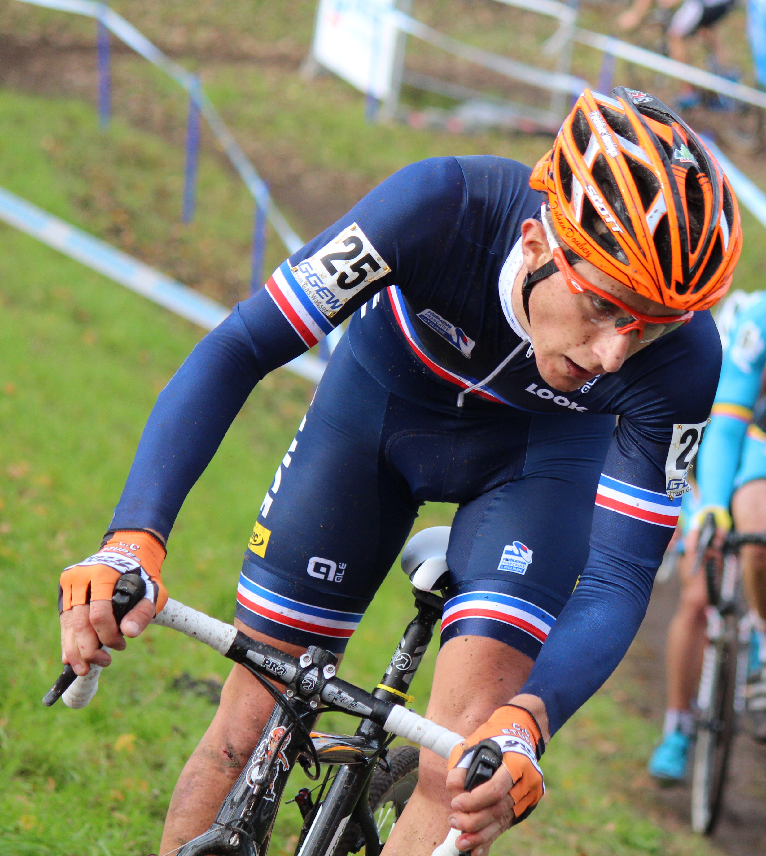 Fabien Doubey